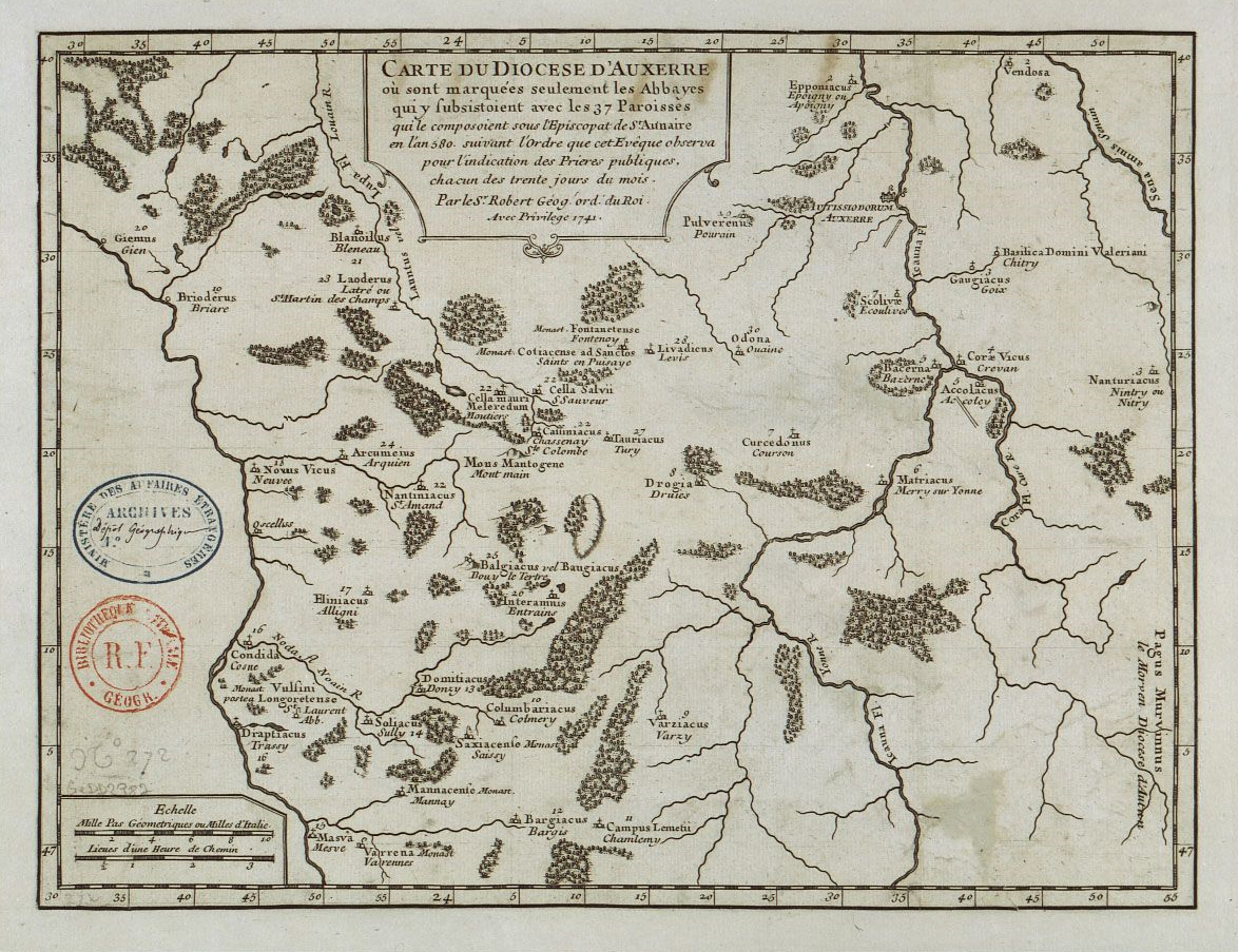 Map of the diocese of Auxerre in the second half of the 6th century, at the time of Aunaire (bishop of Auxerre 573-603), showing all the parishes and all the religious establishments of the time in Auxerre diocèse. Map made in 1741 by "Robert, King's geographer" ; reproduced in abbot Alexandre Parat's book Mémoires concernant l’histoire ecclésiastique et civile d’Auxerre, vol. 1, 1743, p. 117 (the link only provides a partial view of the map).